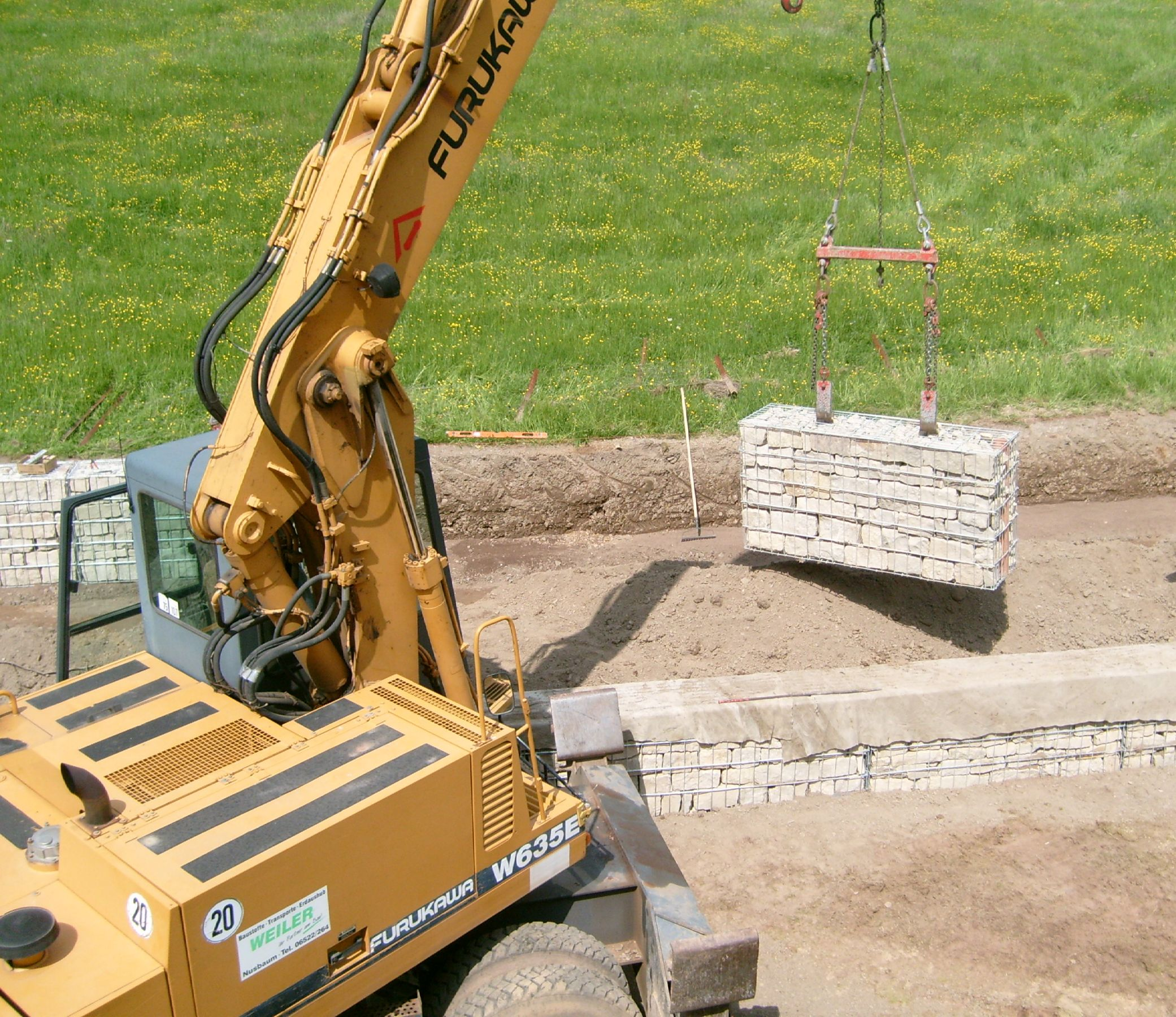 Gabioune gi mat engem Bagger gesat - 16. Mee 2008.